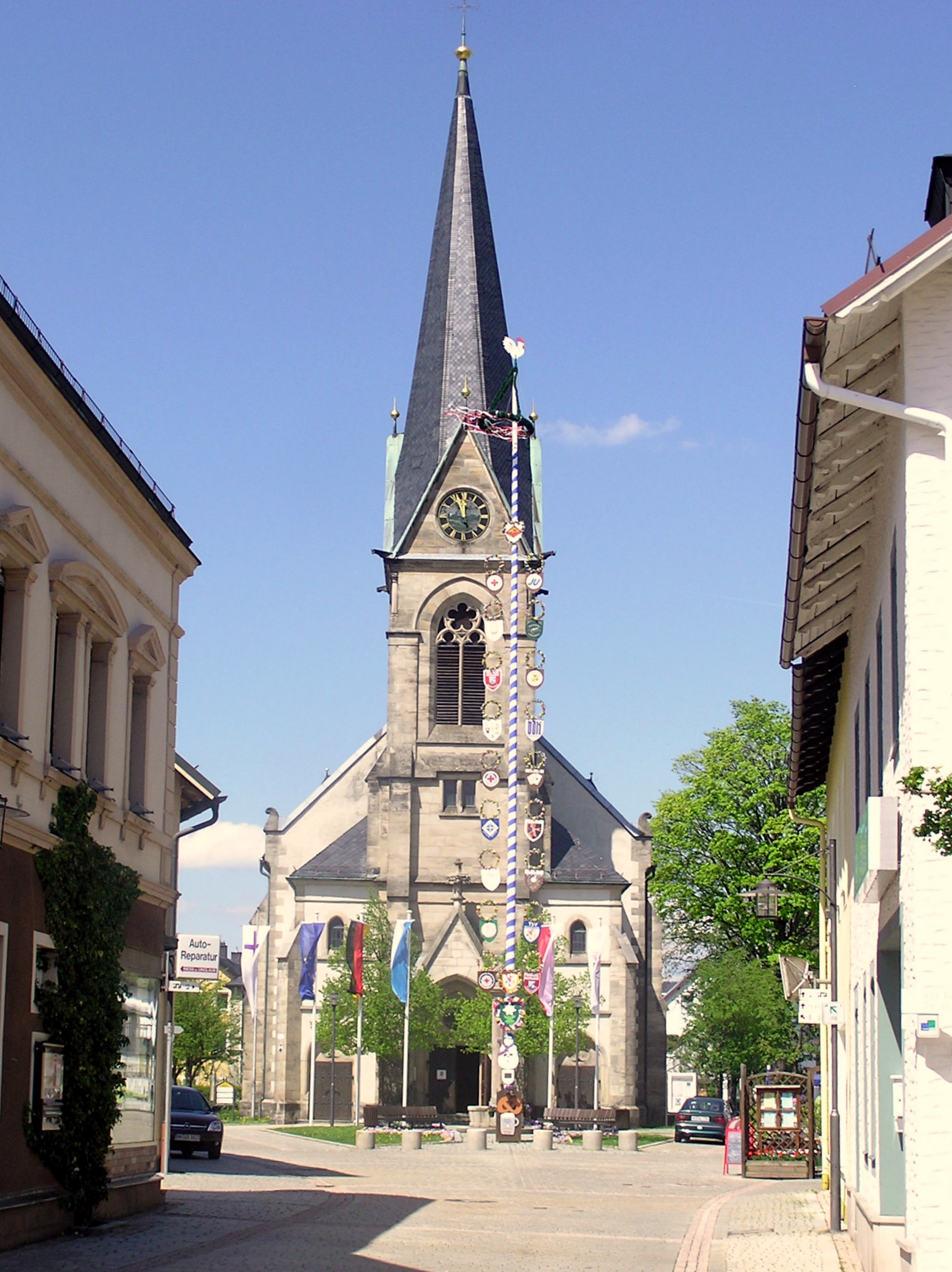 Evangelische Matthäuskirche Bischofsgrün